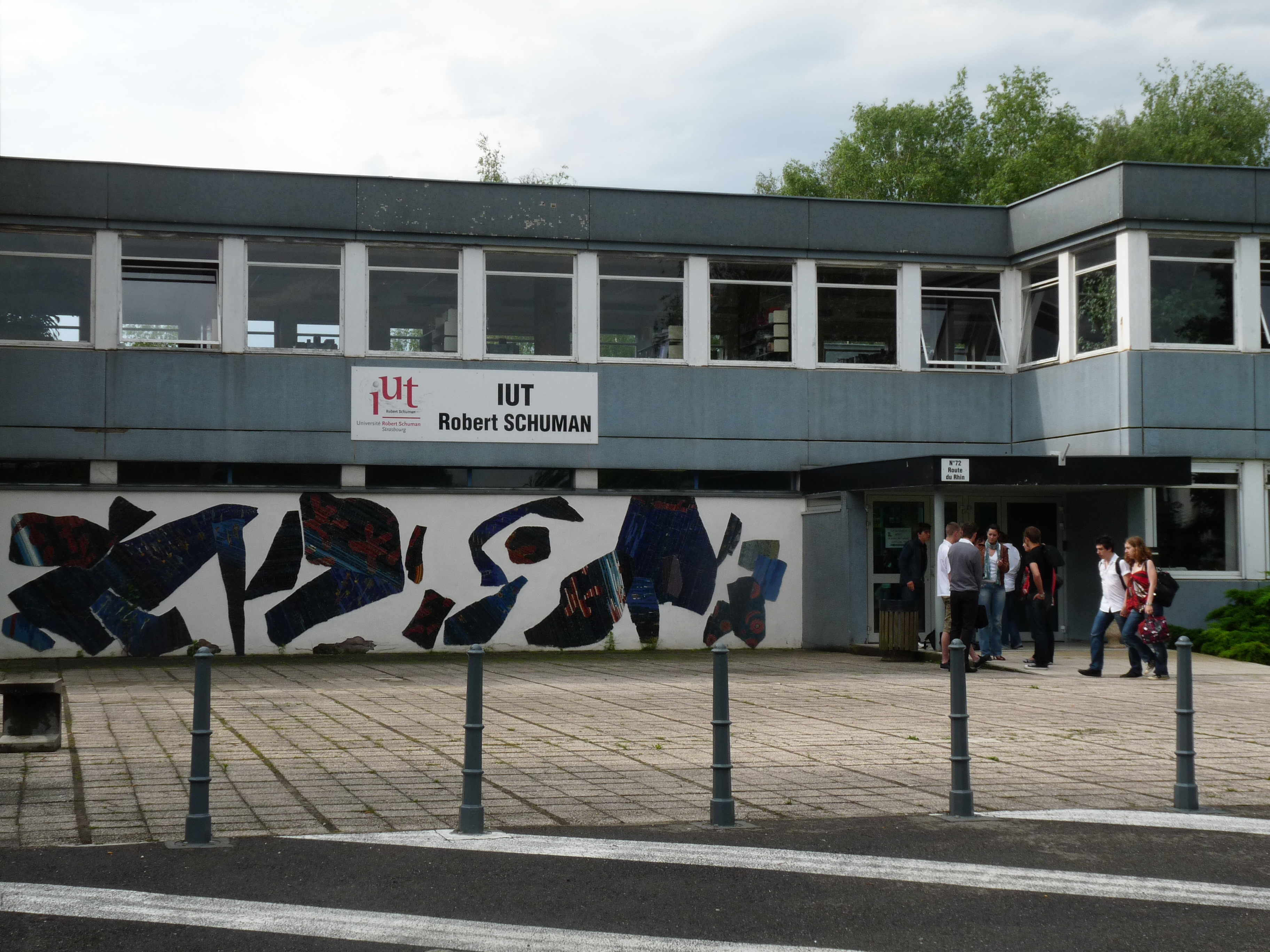 Institut universitaire de technologique Robert Schumann à Illkirch-Graffenstaden (Communauté urbaine de Strasbourg)